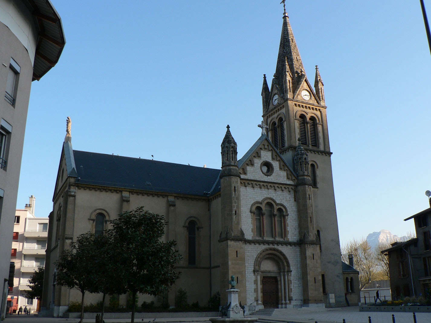 Église de Domène (Isère, France)